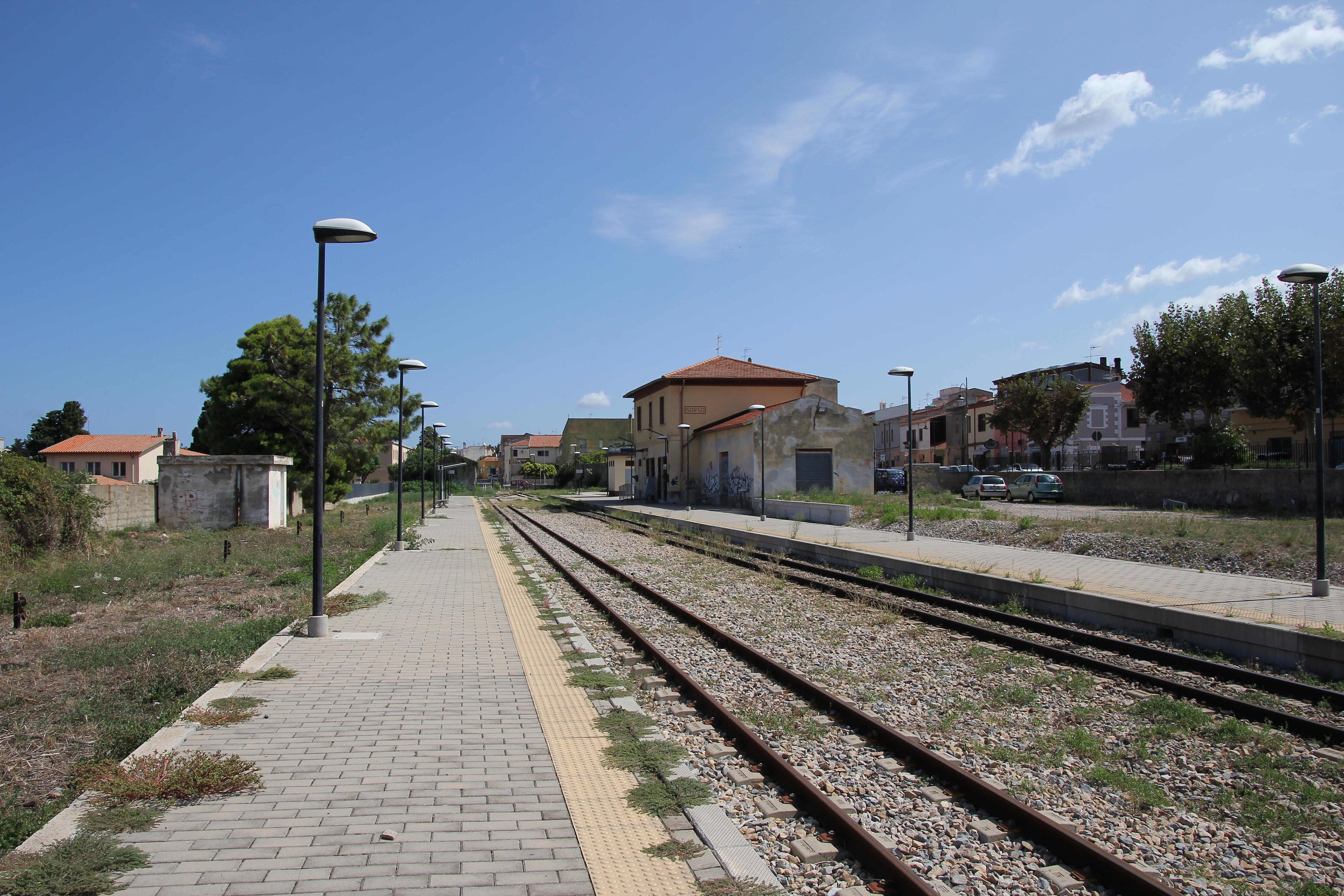 Sorso, stazione ferroviaria